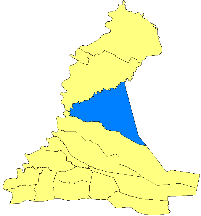 Mapa de San Juan del Ñeembucú, Paraguay.